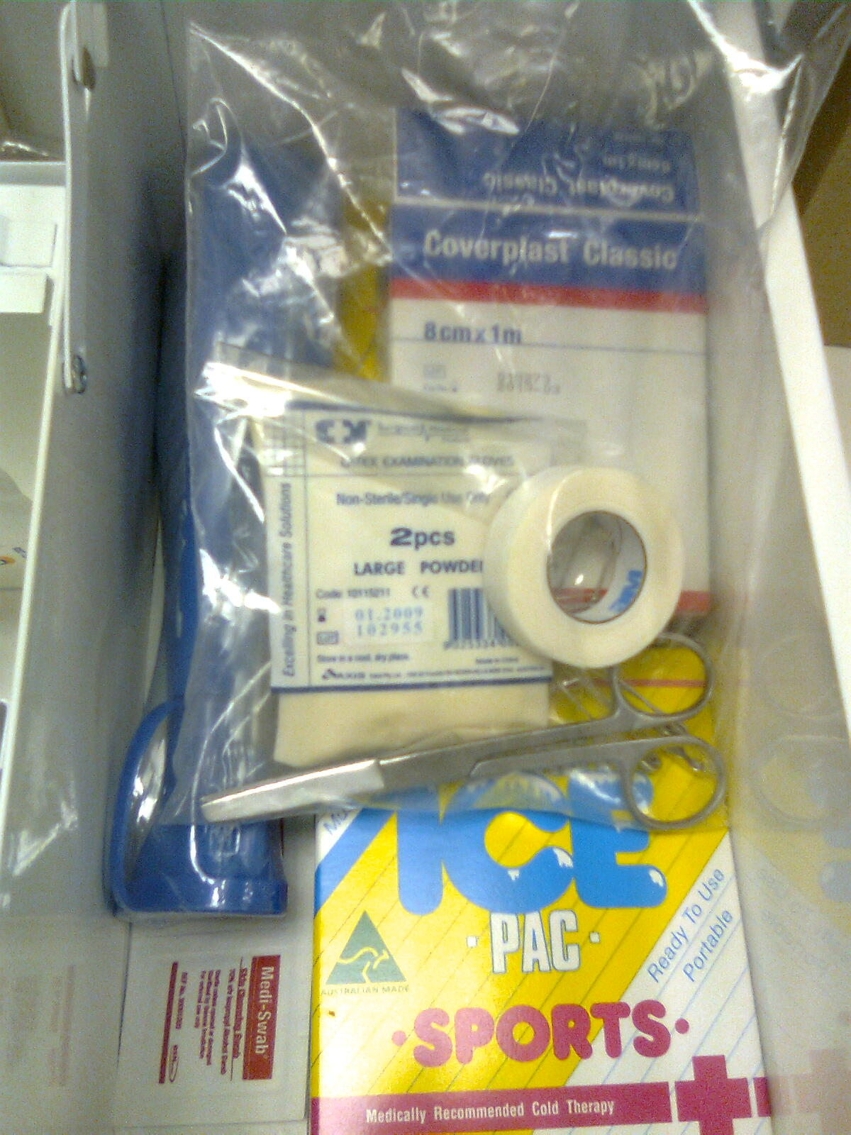 प्रथमोपचार पेटी साहित्य